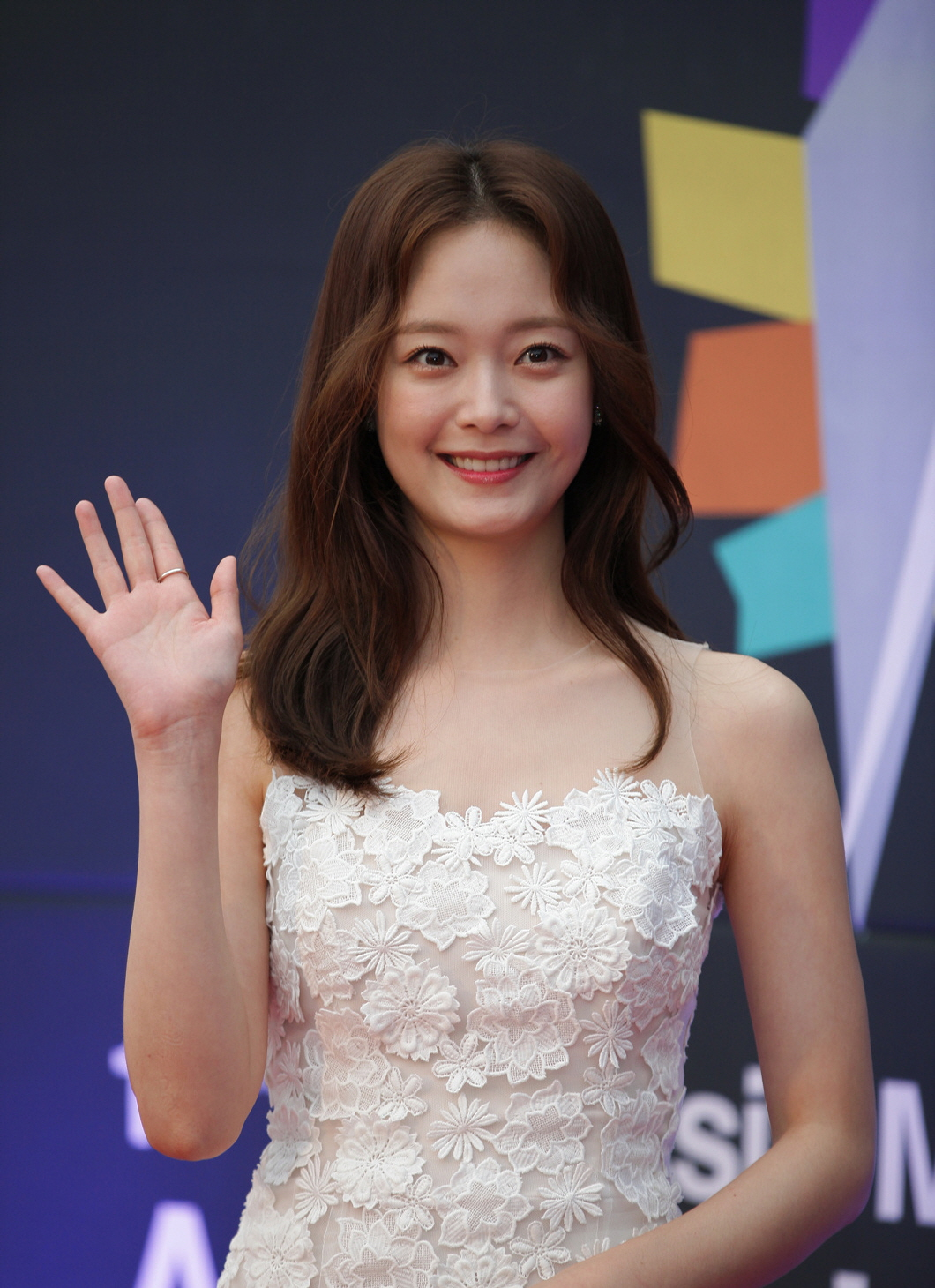 2017 아시아 모델 페스티벌 레드카펫